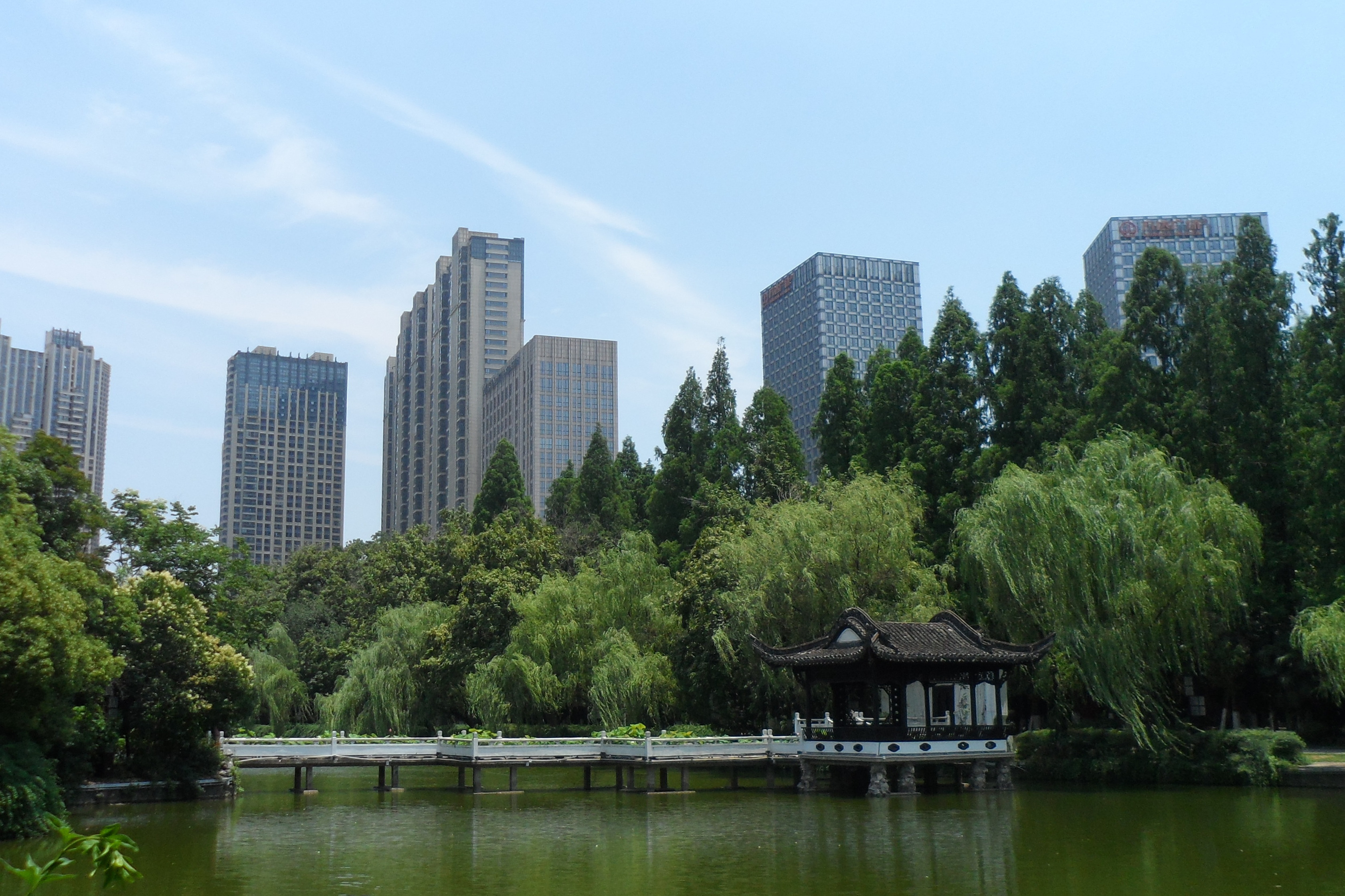 包公园内的浮莊